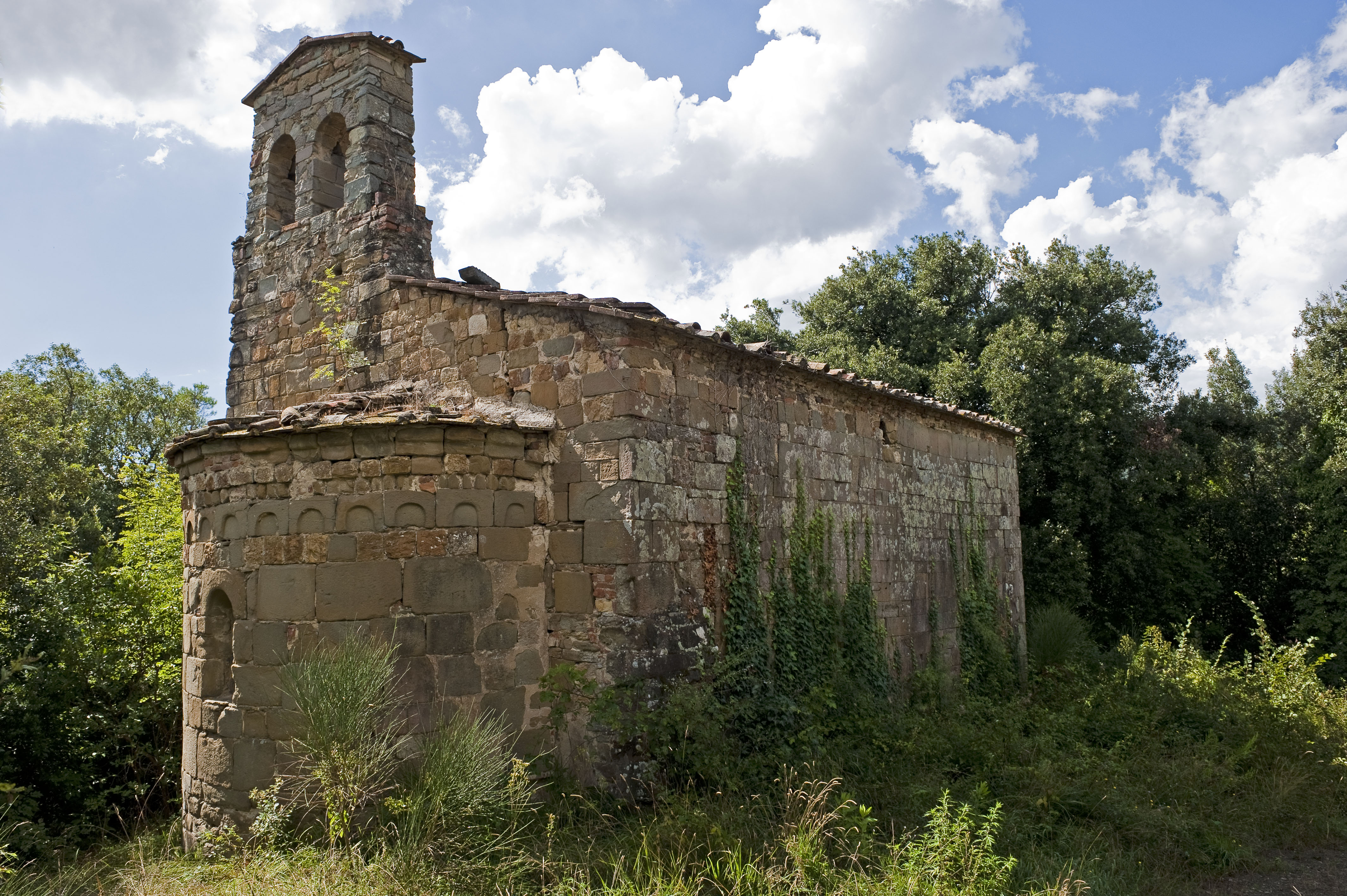 Abside e fiancata sinistra della chiesa di San Michele Arcangelo a Luciano (Montelupo Fiorentino)